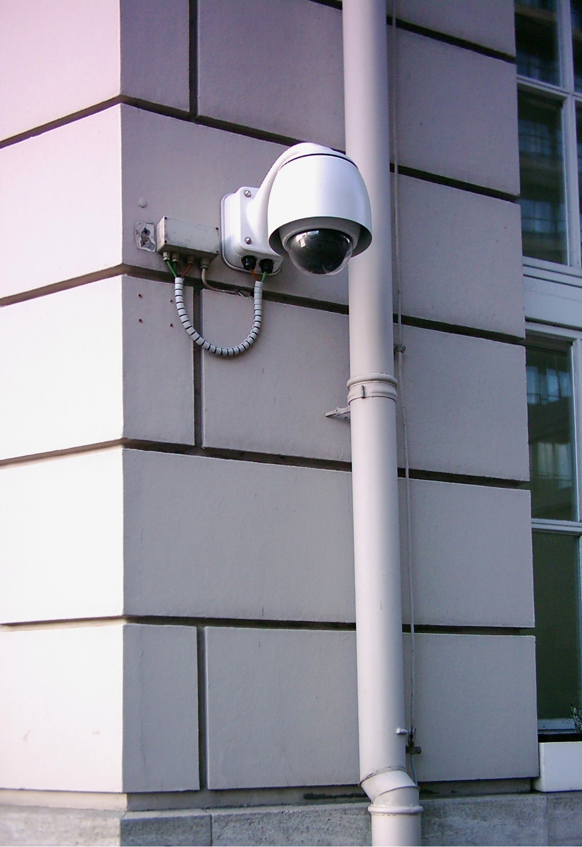 Kamera am Gebäude der Commerzbank Hamburg-Altstadt.